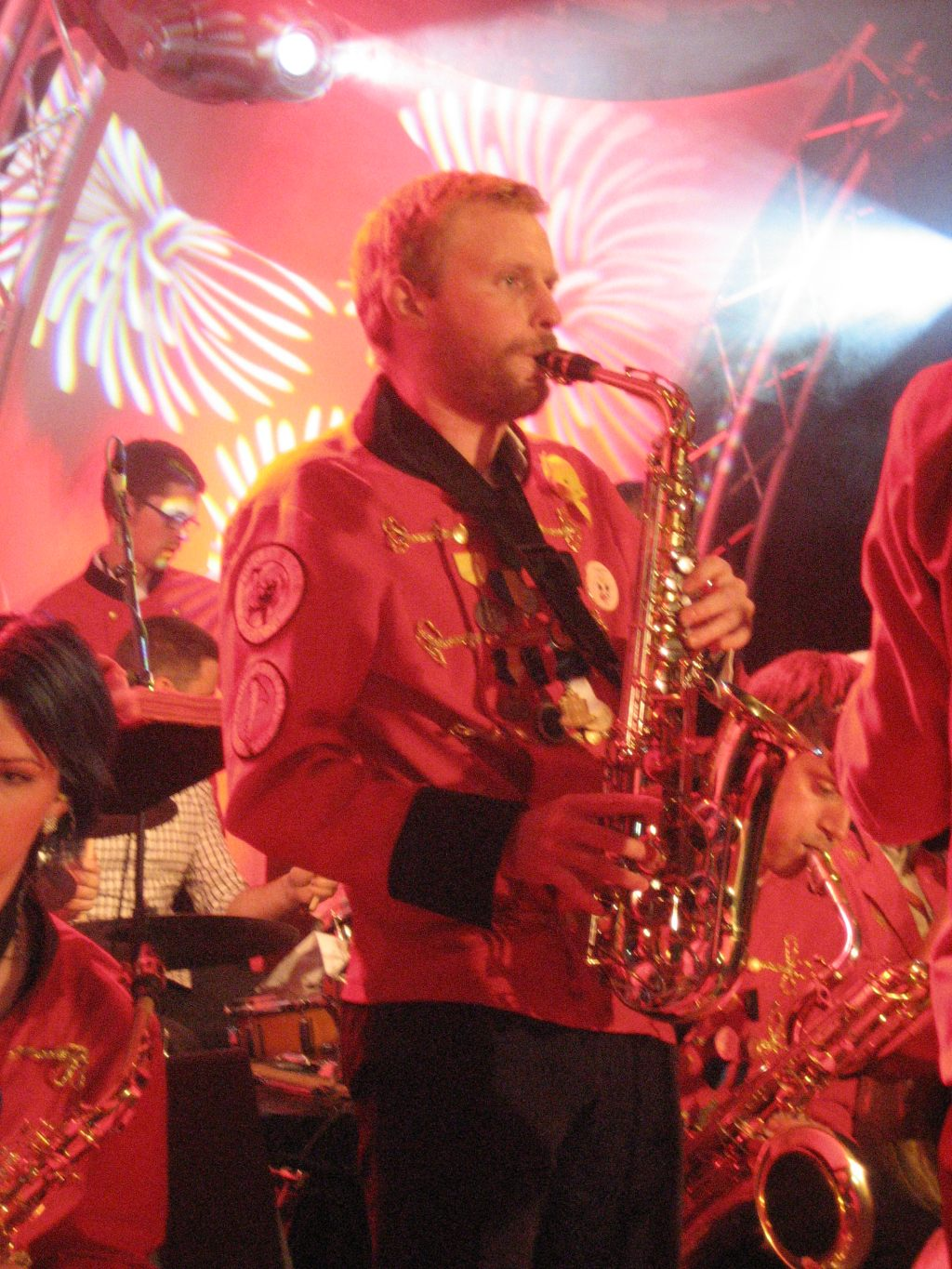 Konsert med studentorkestern Tongångarne på Casino Cosmopol i Göteborg.